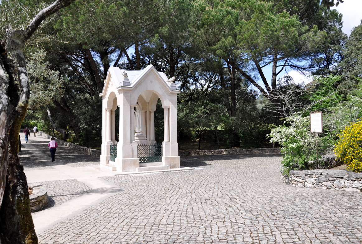 Calváro Hungaro Fatima 0593